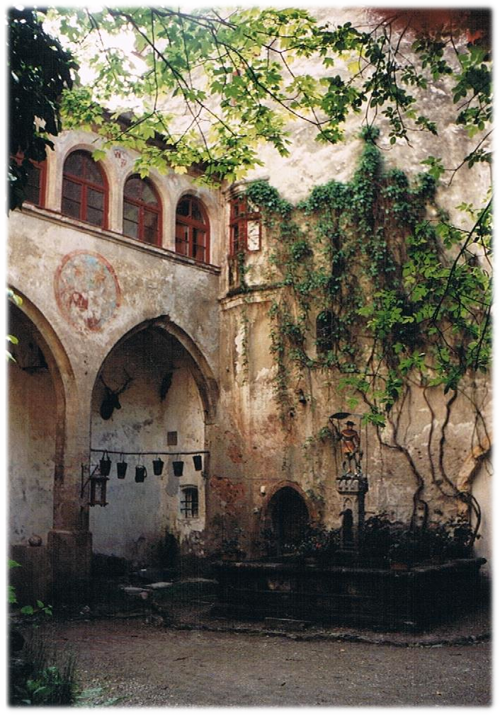 Innenhof von Schloß Friedberg bei Volders in Tirol.